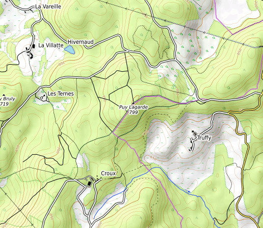 carte réalise sur umap This map may be incomplete, and may contain errors. Don't rely solely on it for navigation.